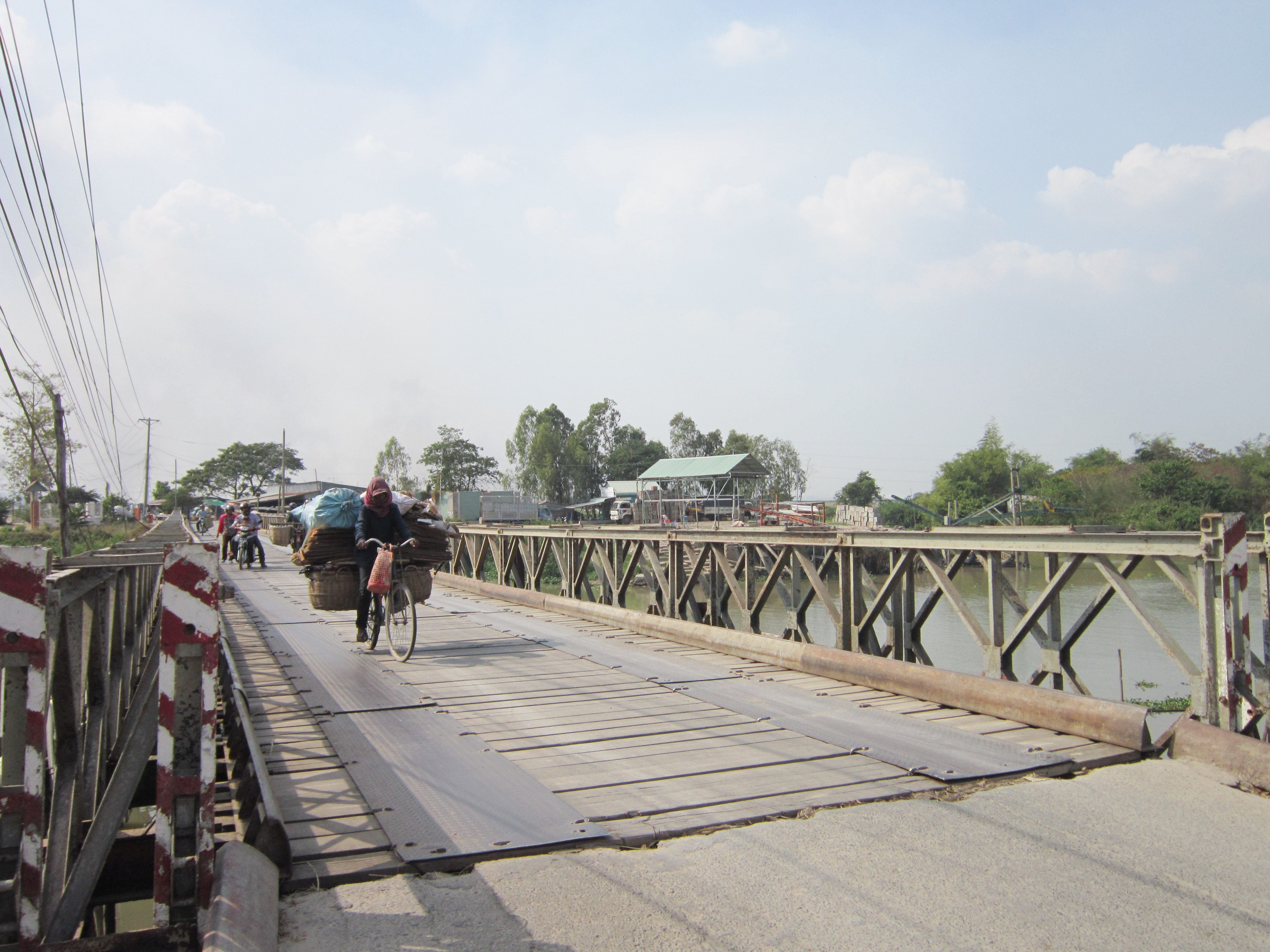 Cầu sắt Tịnh Biên bắc qua kênh Vĩnh Tế, dẫn đến Cửa khẩu Quốc tế Tịnh Biên. Đối diện về phía Campuchia là cửa khẩu Phnumden.